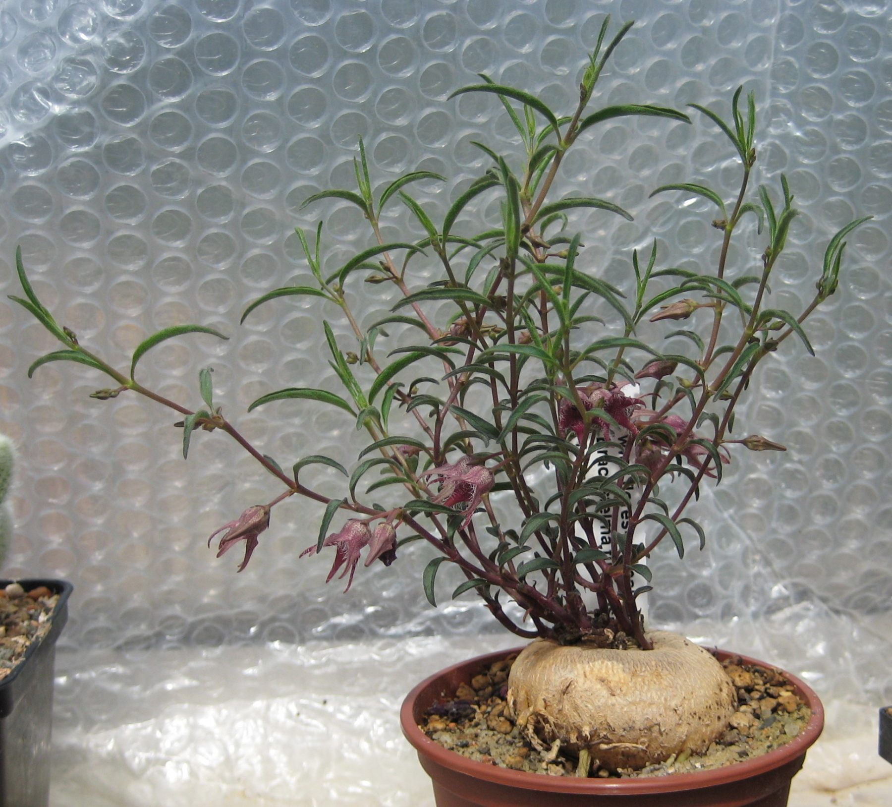 Brachystelma tuberosum in Kultur